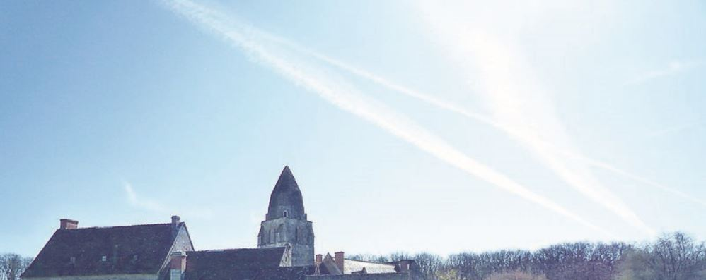 Vue du clocher des toits de bâtiments du prieuré Saint Jean du Grais.